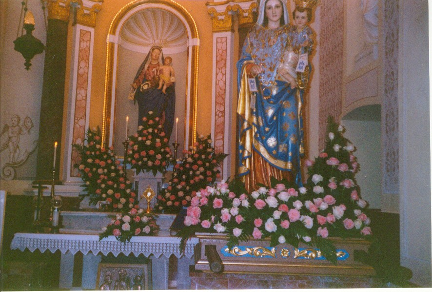 Santuario del Carmine alla fine del XX secolo.